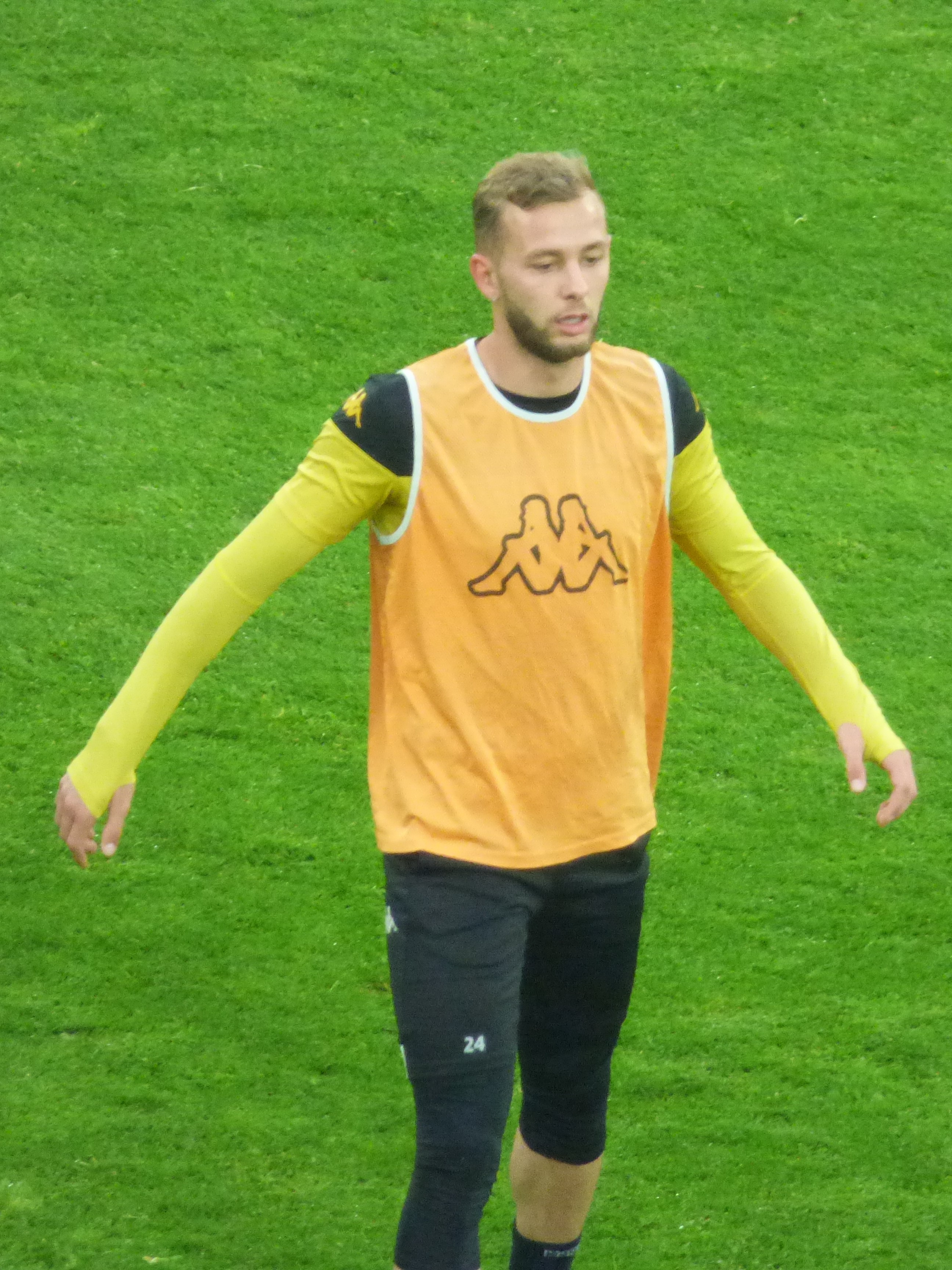 Yohan Demoncy avant le match RC Lens / US Orléans, le 17 mai 2019, comptant pour la 38ème journée du championnat de France de football de Ligue 2 2018-2019, au Stade Bollaert-Delelis.